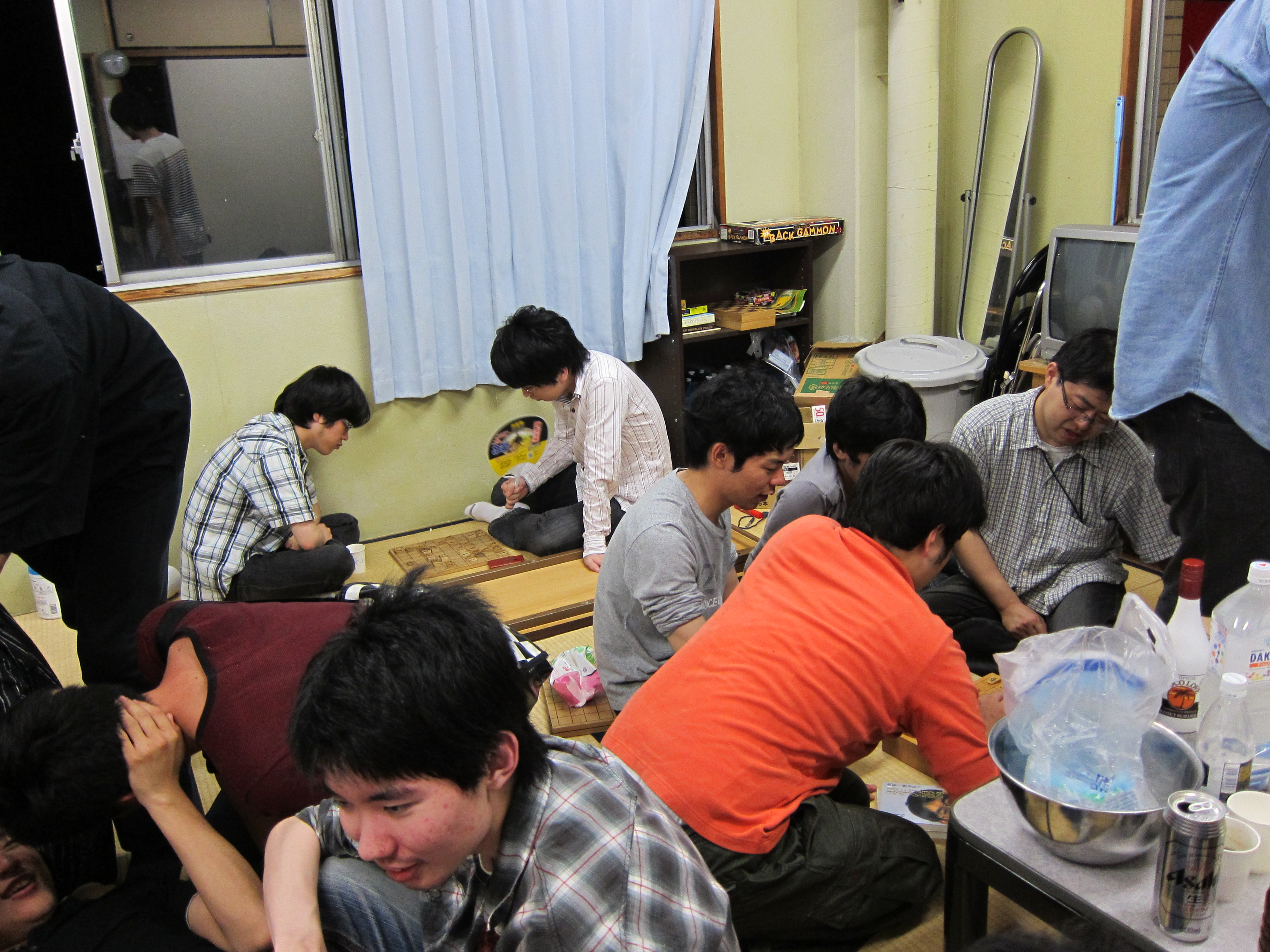 Konpa